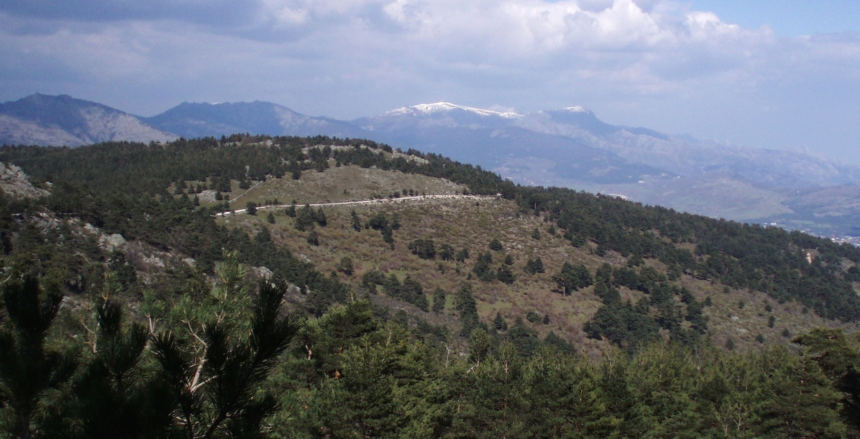 Vista general de la vertiente madrileña de la zona central de la Sierra de Guadarrama (centro de España). La imagen ha sido tomada cerca de Cabeza Líjar (1.824 m), una montaña en cuya cima está el límite de las provincias de Madrid, Segovia y Ávila. Esta montaña, a la que se accede fácilmente por una pista forestal que sale del puerto de Guadarrama (1.511 m), tiene en su cima una pequeña atalaya que constituye uno de los mejores miradores de toda la sierra. En la imagen se aprecia la pista forestal que da acceso a Cabeza Líjar y al fondo, de izquierda a derecha, las montañas de La Peñota, Siete Picos, la Bola del Mundo y La Maliciosa.